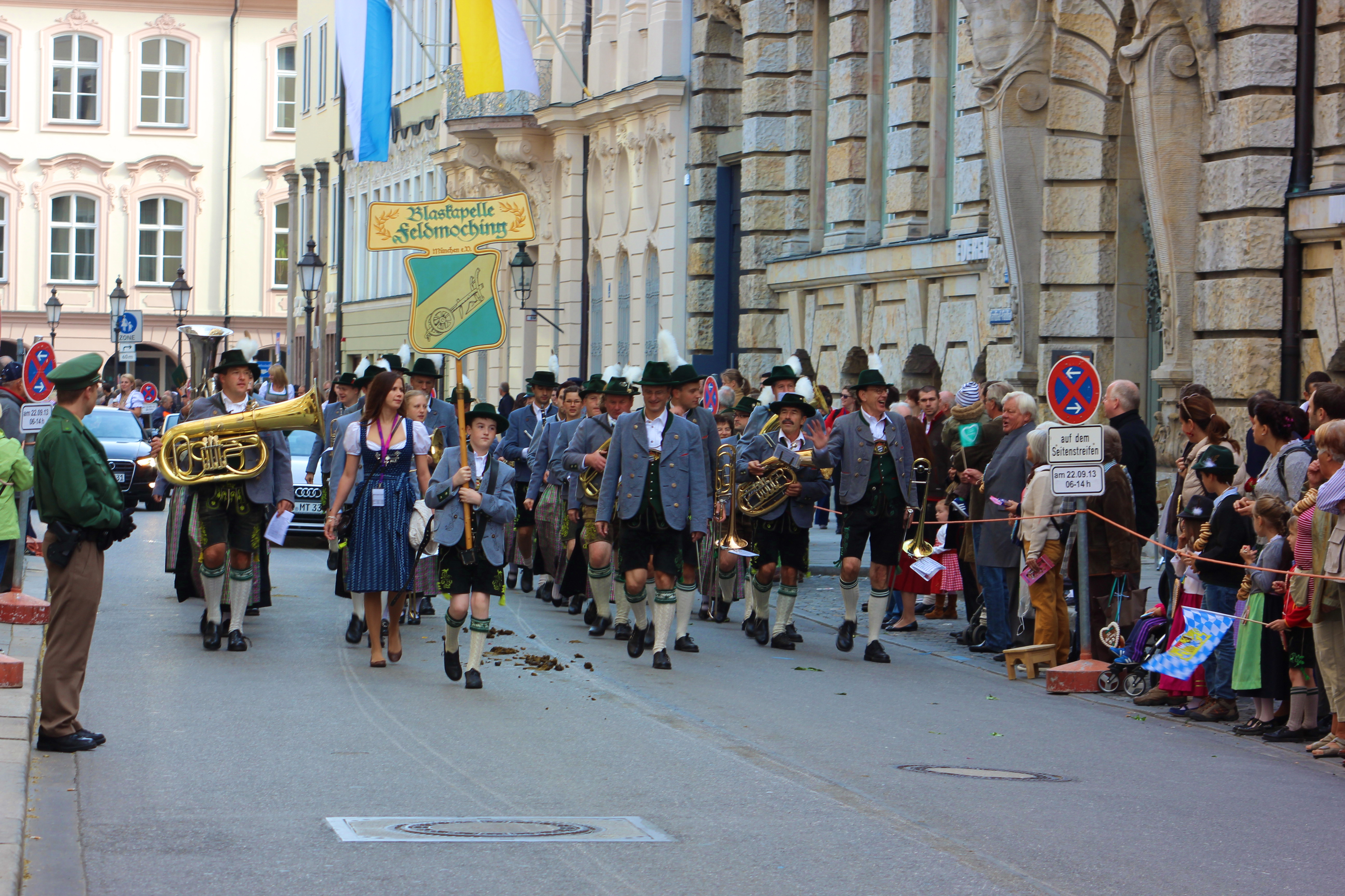 Teilnehmer aus Feldmoching auf dem Trachten- und Schützenzug in München am ersten Oktoberfestsonntag.